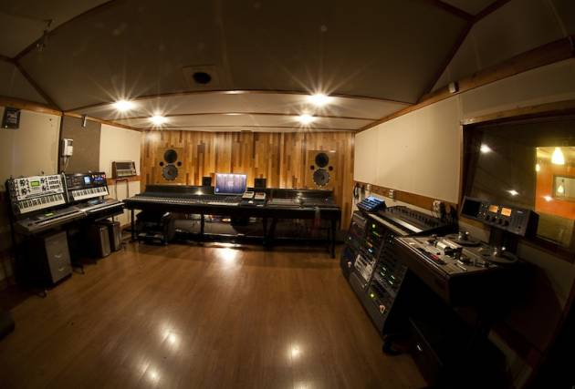 1 аппаратная студии "Параметрика"